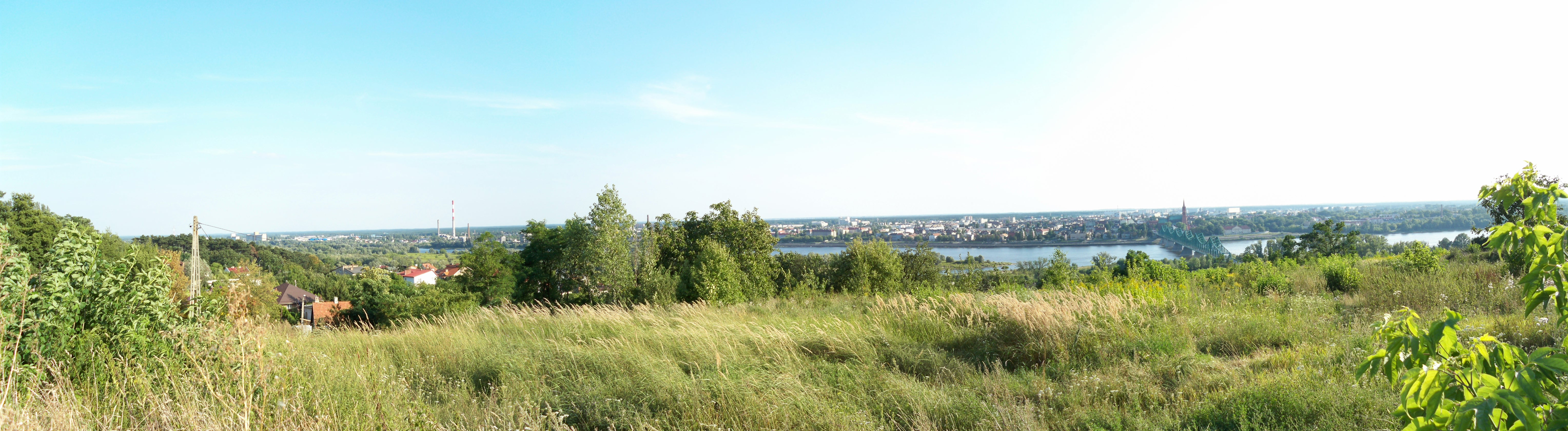 Widok ze Wzgórz Szpetalskich (2009 r.)